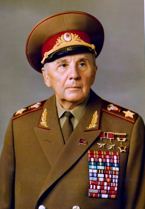 Маршал Советского Союза Кирилл Семёнович Москаленко (1902 — 1985)